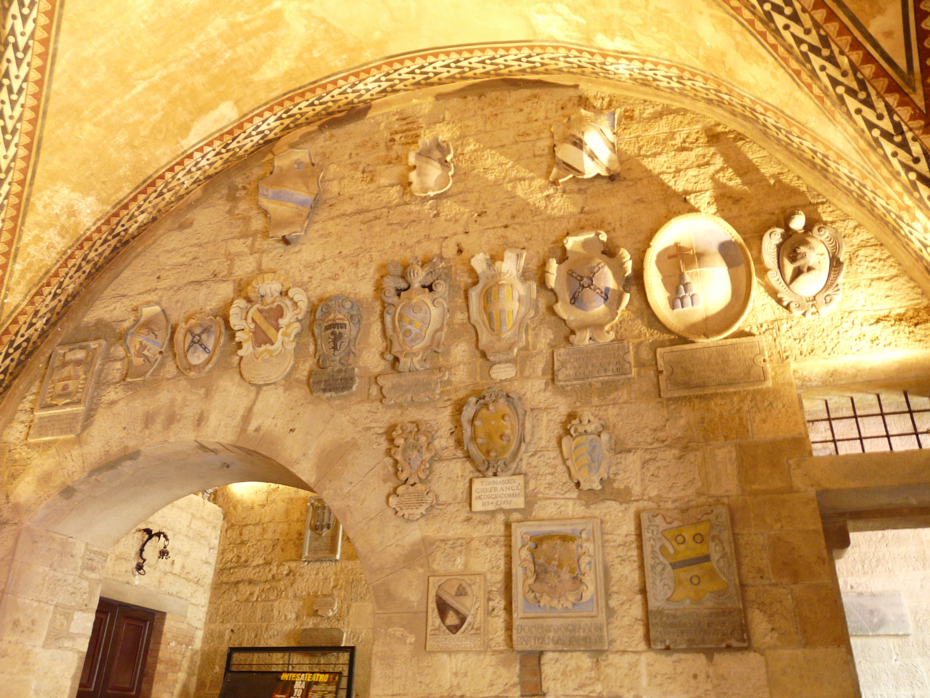 Palazzo dei Priori, Volterra, Toscana, Italia